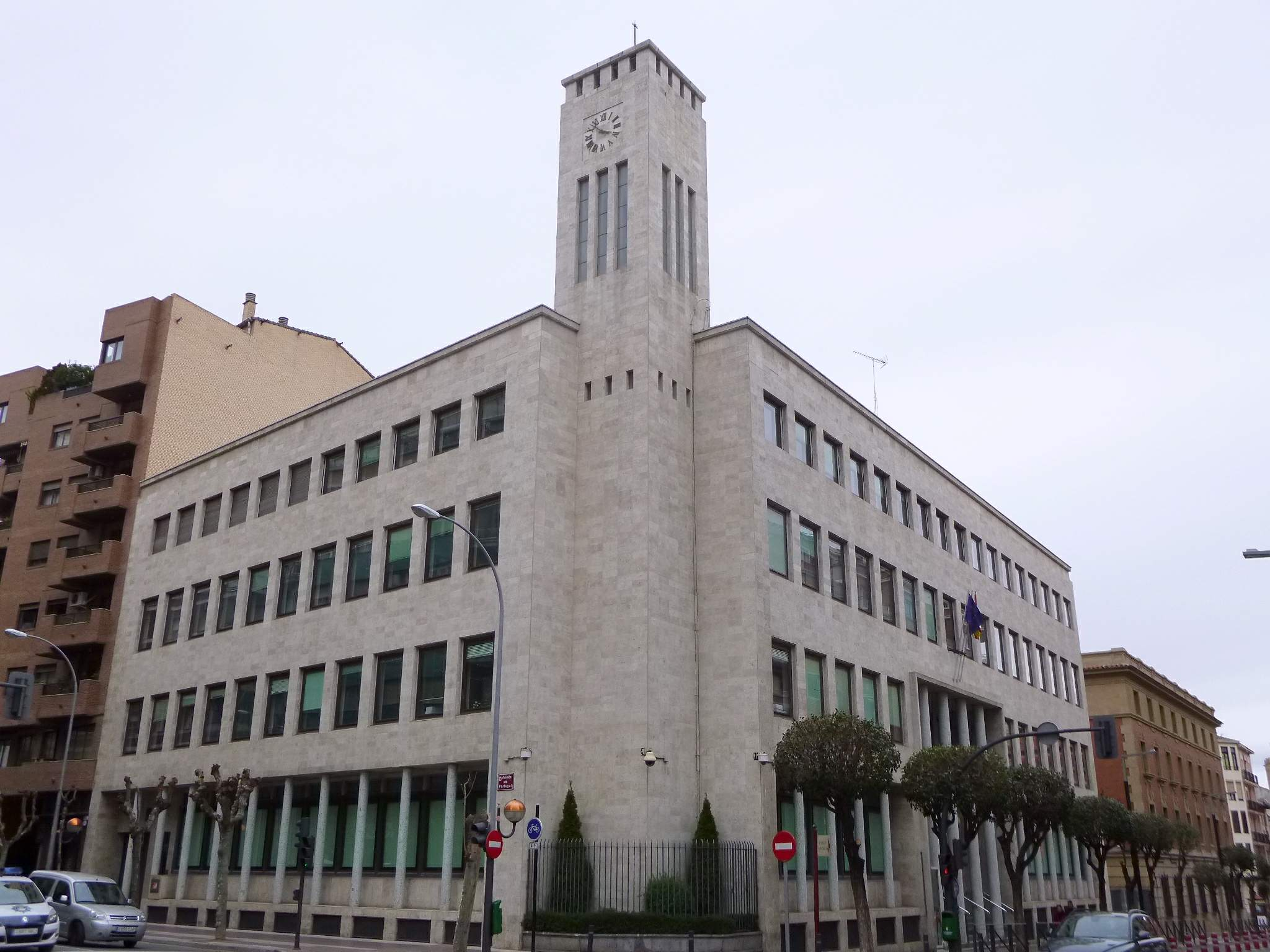 Agencia Tributaria de Logroño (La Rioja)